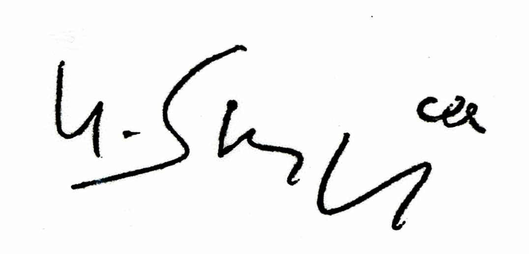 Signature du peintre Gustave Singier, scan d'après carte de voeux. This signature is believed to be ineligible for copyright and therefore in the public domain because it falls below the required level of originality for copyright protection both in the United States and in the source country (if different). In this case, the source country (e.g. the country of nationality of the signatory) is believed to be France. Cette image ou le texte qui y est représenté est seulement composé de formes géométriques simples et de texte. Elle n’atteint pas le seuil d'originalité nécessaire pour la protection du droit d’auteur, et est donc du domaine public. See autographs of Magritte and Picasso